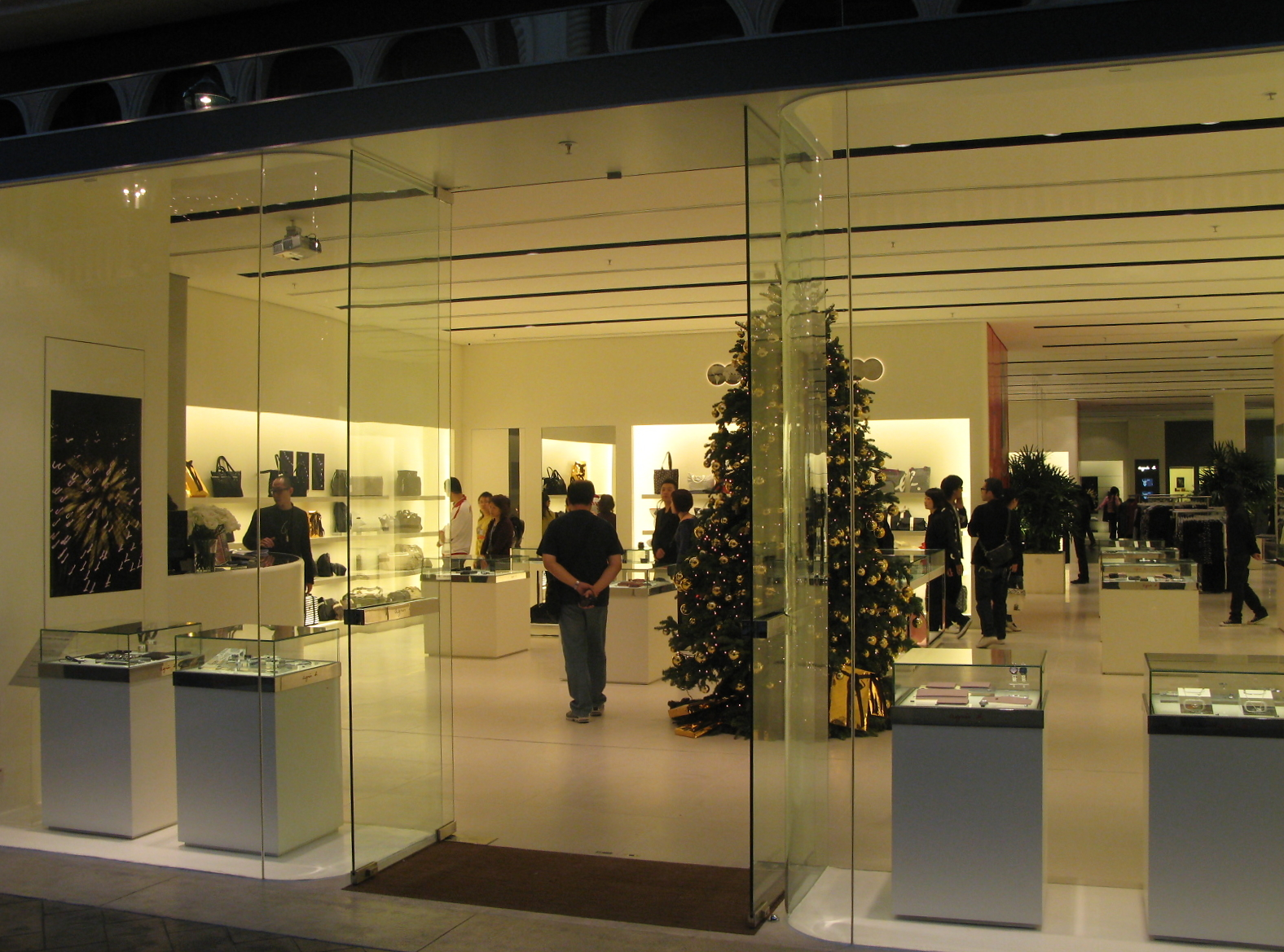 AgnisB Macau Store